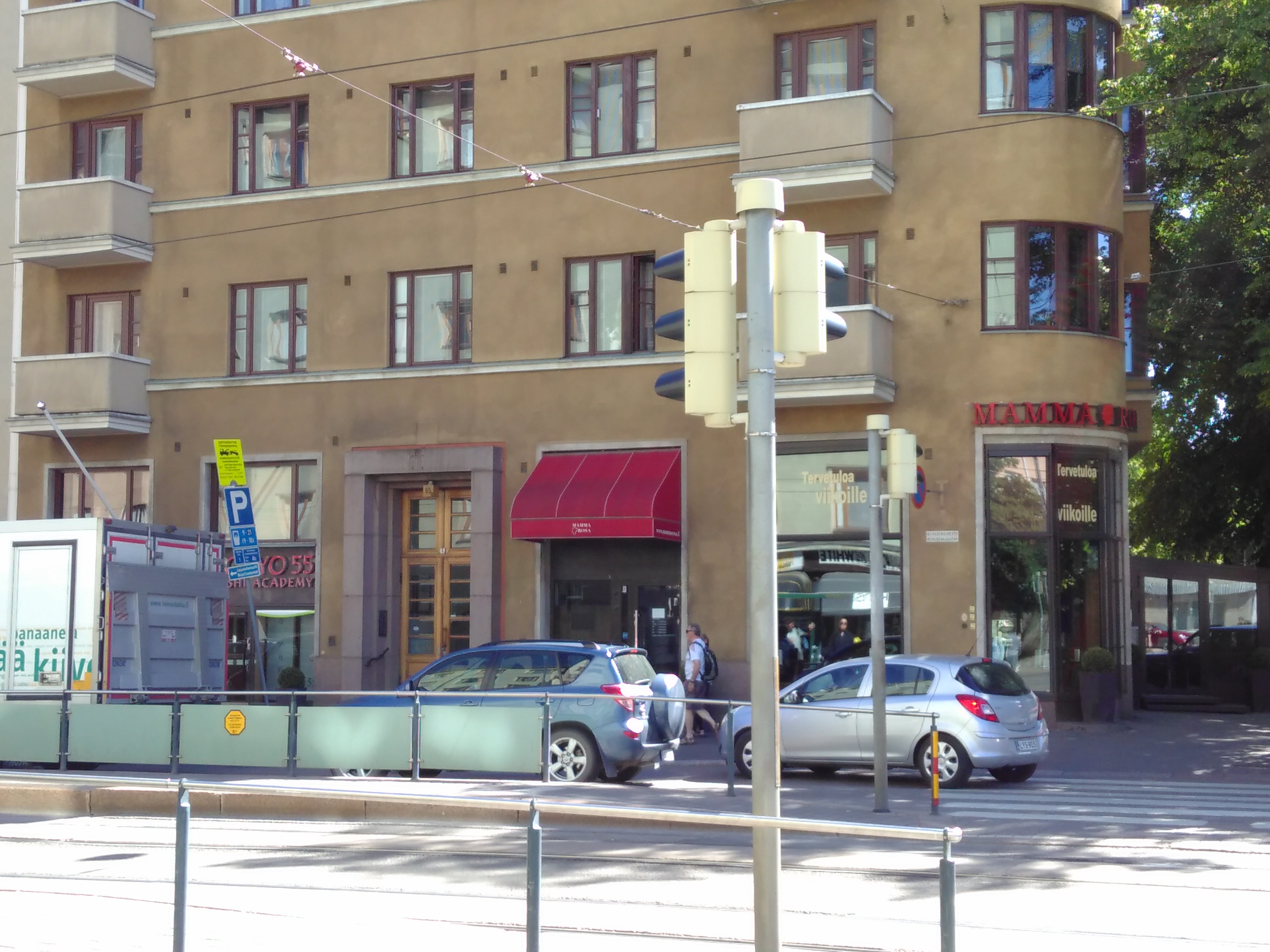 Ravintola Mamma Rosa, Töölö, Helsinki